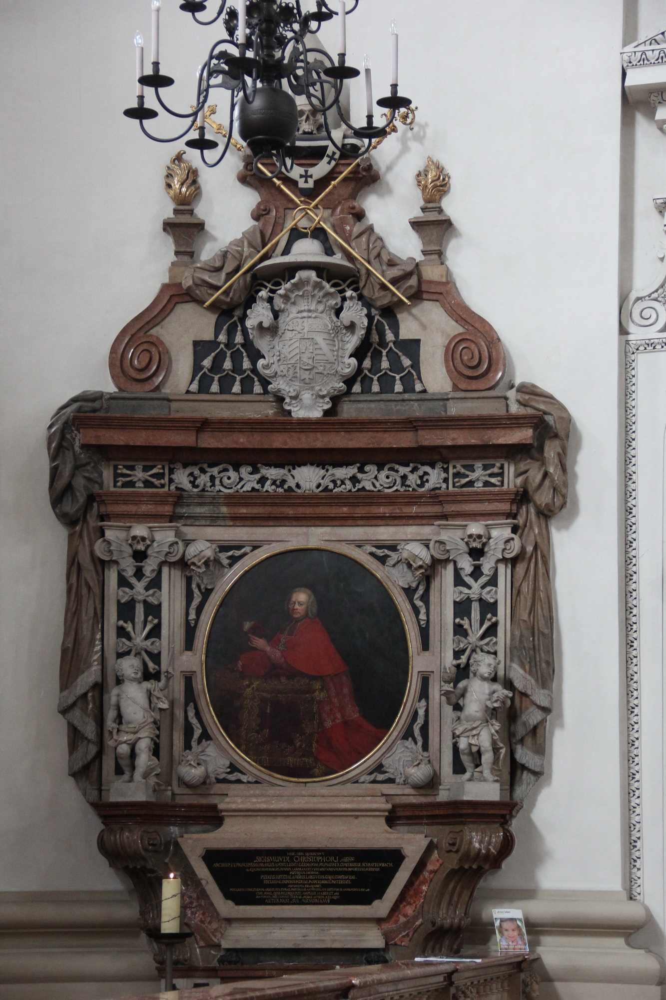 Salzburg Cathedral - cenotaph of Archbishop Sigismund Christoph von Schrattenbach